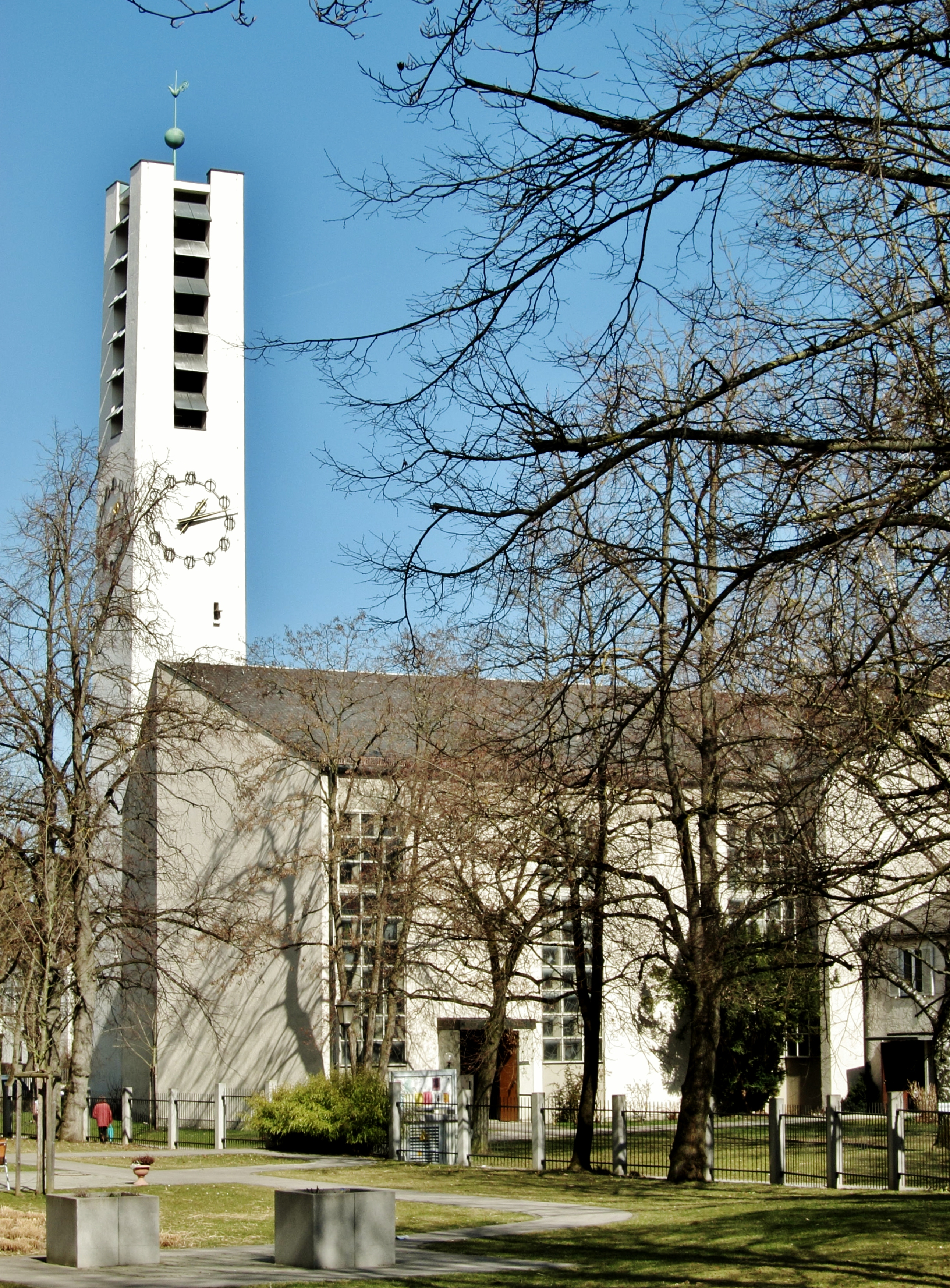 Agnes-Bernauer-Straße 181; Kath. Pfarr- und Klosterkirche der Salvatorianer St. Willibald, mit schlankem Kampanile von der Straße zurückgesetzter, kubischer Kirchenbau über breitem Langhaus und kurzem Querschiff, Dachform und zentralisierender Raumkörper prismenartig ausgebildet; mit Unterkirche; 1958 von Hansjakob Lill errichtet; Vierungsecken durch hohe Farbglasfenster von Adalbert Burkart betont (erste abstrakte Glasmalerei an Kirchenfenstern in München); mit Ausstattung; Klostergebäude und Pfarrzentrum als hakenförmiger Flügel südlich angebaut.